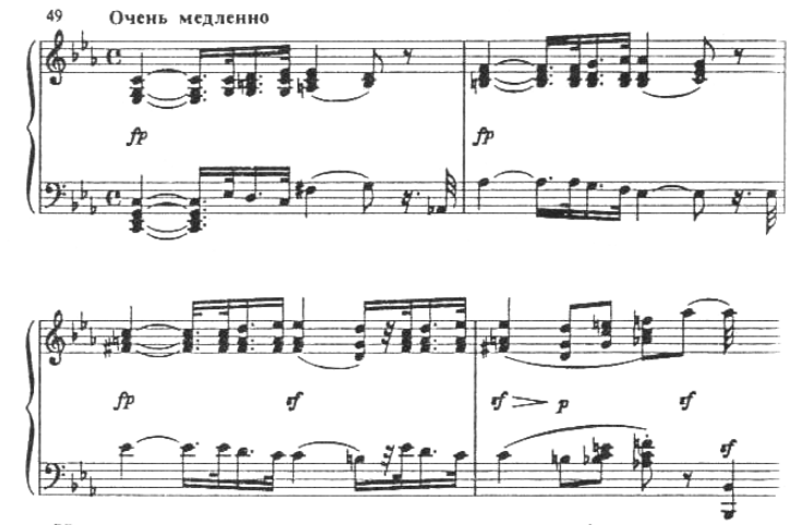 Патетичная соната